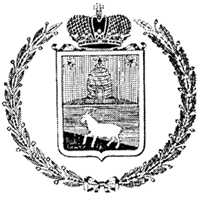 Проект герба Козлова